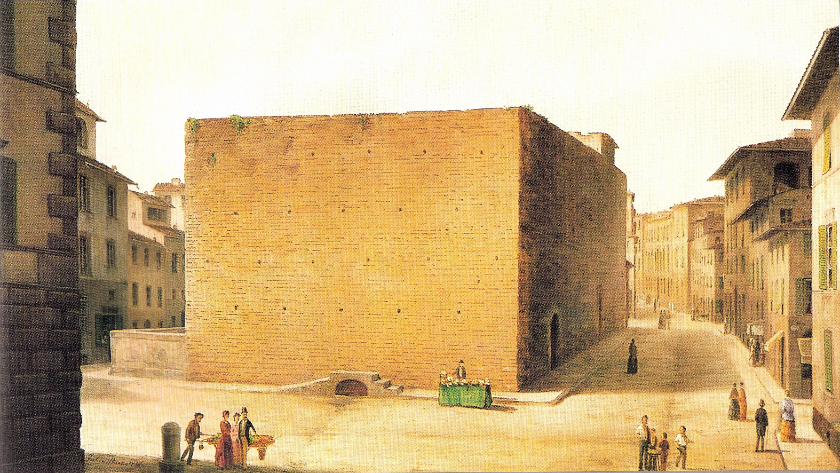 Isola delle Stinche e via del Fosso dal lato di levante